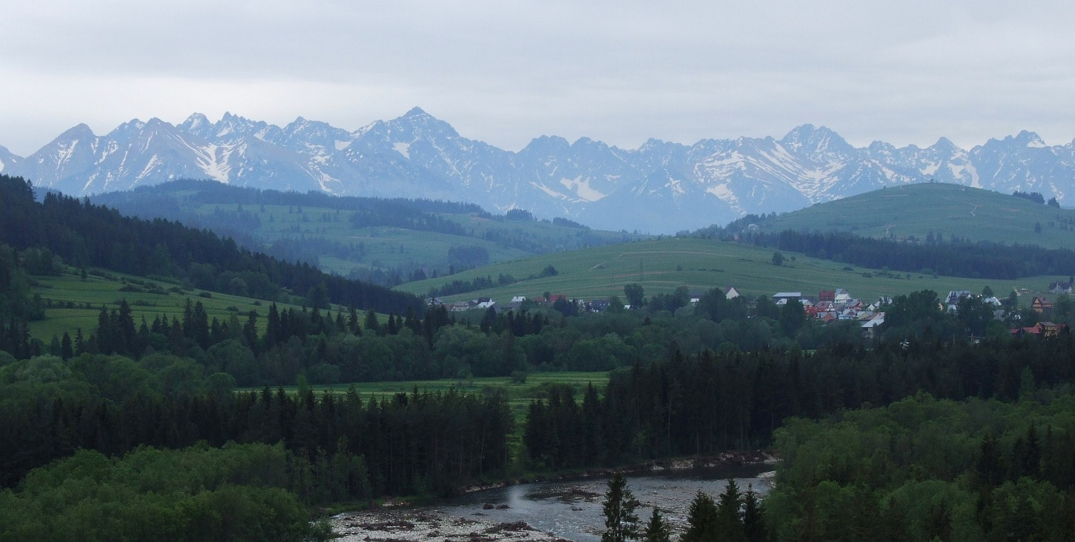 Widok z Obłazowej(rezerwat przełom Białki). Trybsz w powiecie nowotarskim i Tatry